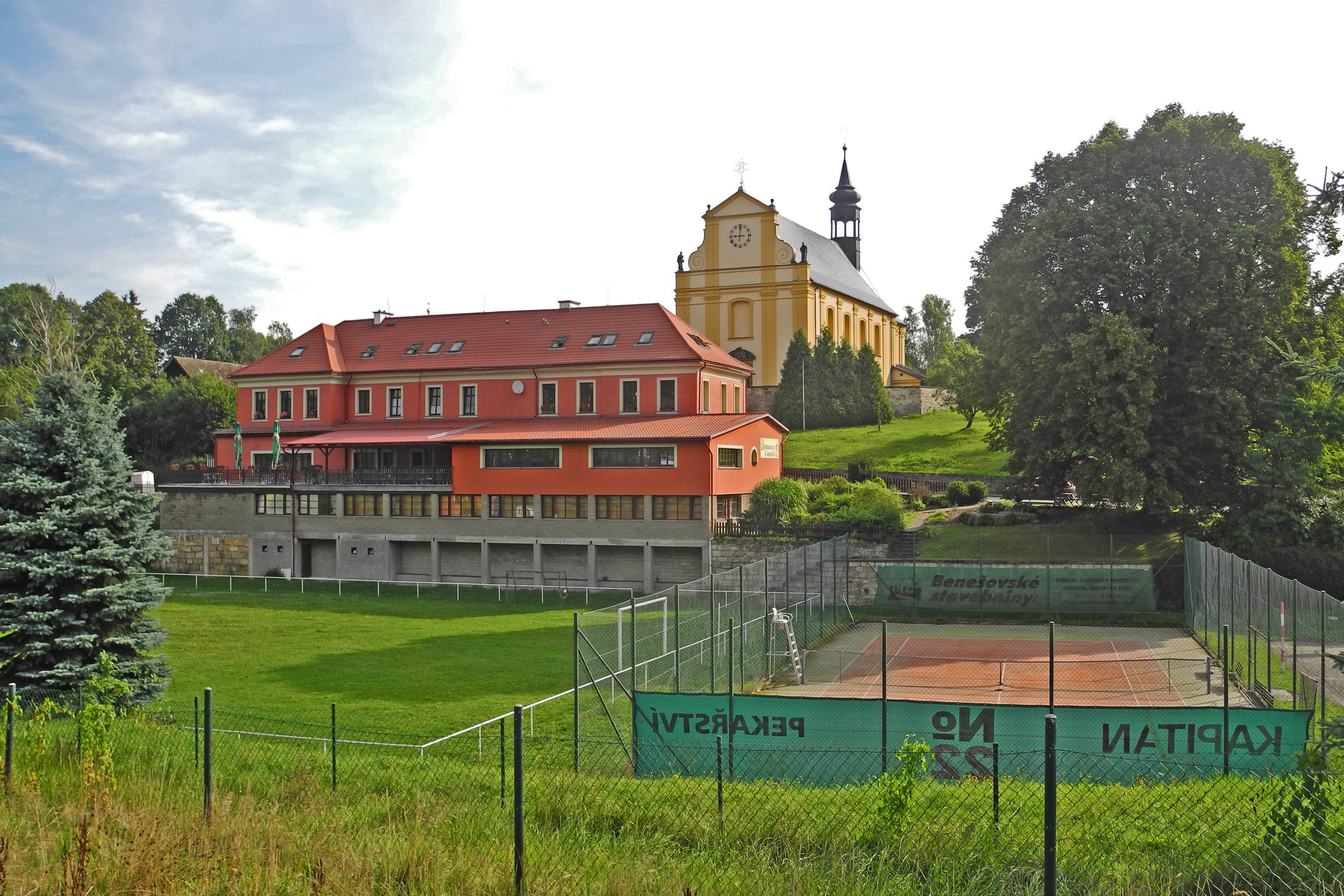 Gemeindeamt und Kirche St. Peter und Paul in Růžová (Rosendorf)